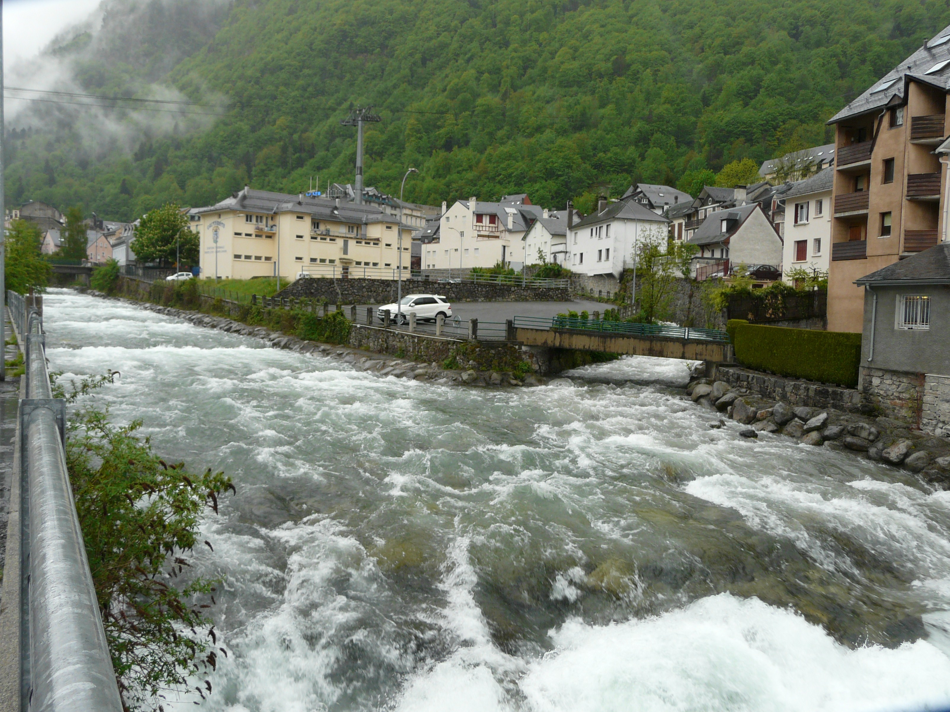 Le gave de Cambasque se jette dans le gave de Cauterets dans le village de Cauterets, Hautes-Pyrénées, France.